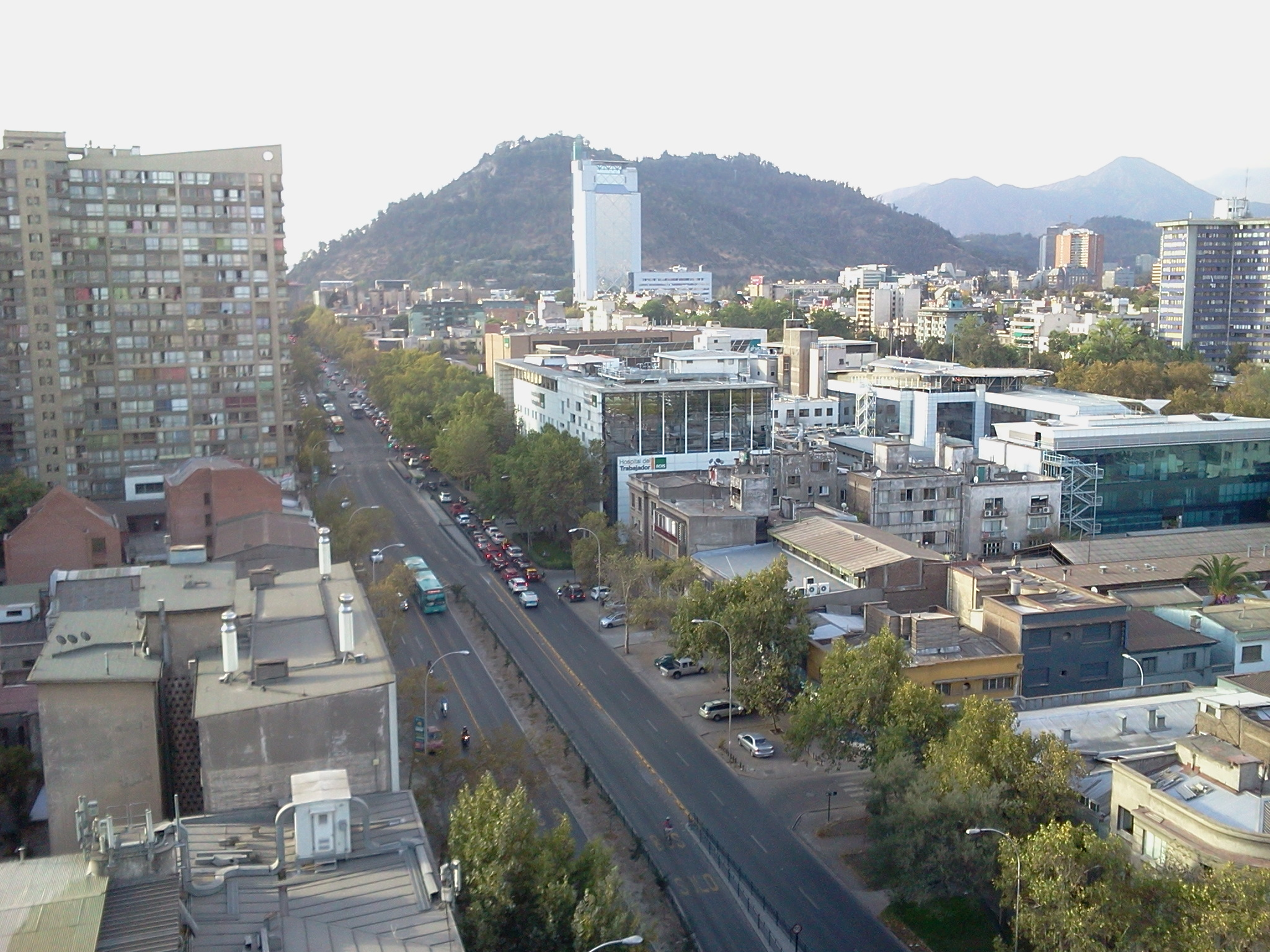 La avenida Vicuña Mackenna, el edificio Telefónica y el cerro San Cristóbal, vistos desde el edificio CIMA. Santiago de Chile, 14 de marzo de 2016.